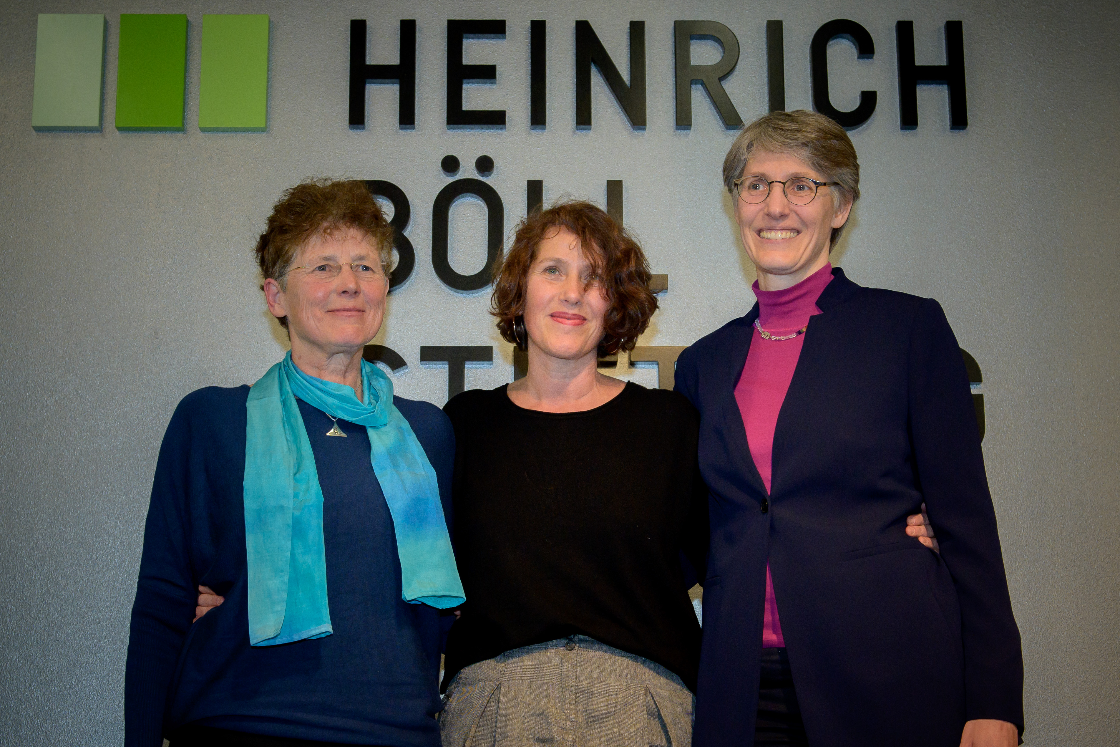 Preisträgerinnen Anne-Klein-Frauenpreis 2019: Kristina Hänel, Nora Szász, Natascha Nicklaus (Ärztinnen)Foto: Stephan Röhl